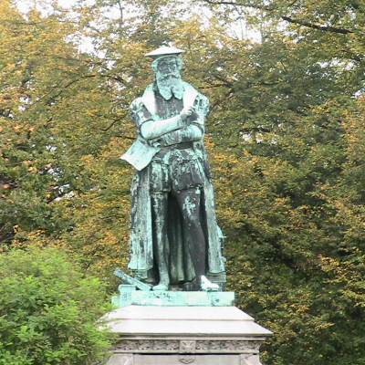 en mia apuda vilaĝo